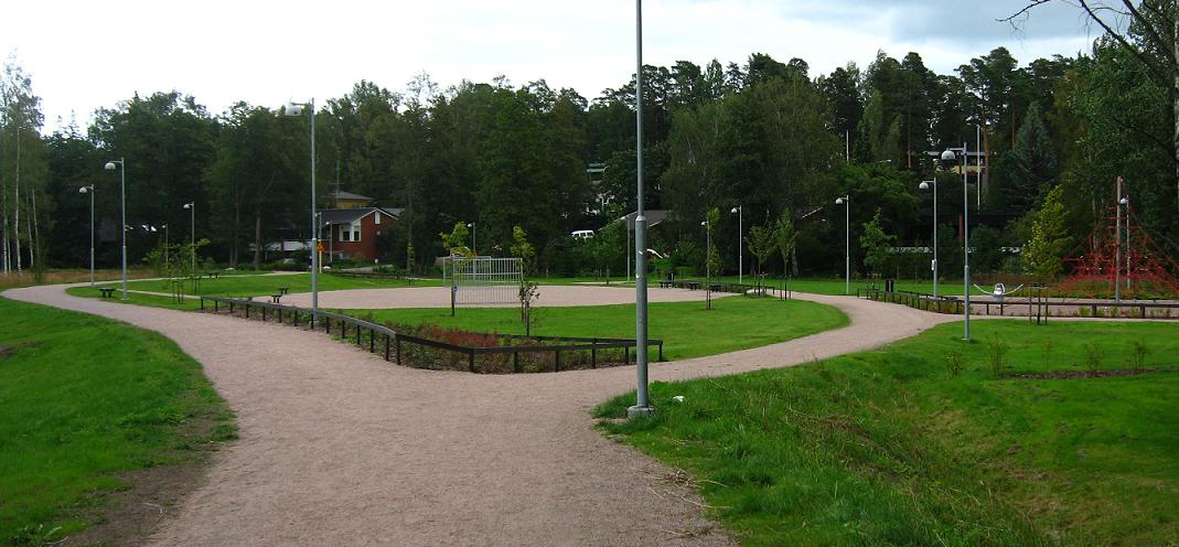 Vanhan väylänpuisto